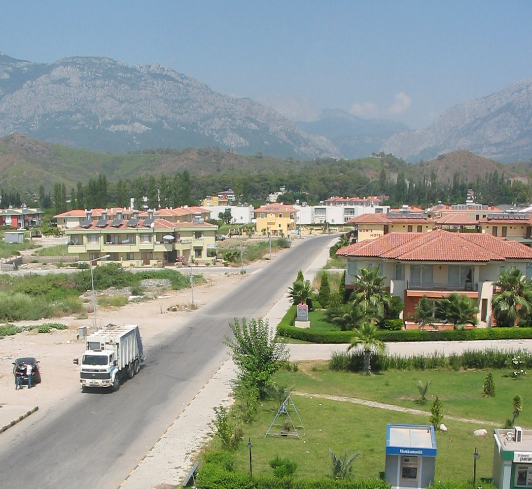 Чамьюва Поселок Чамьюва (Турция). Вид из окна отеля.